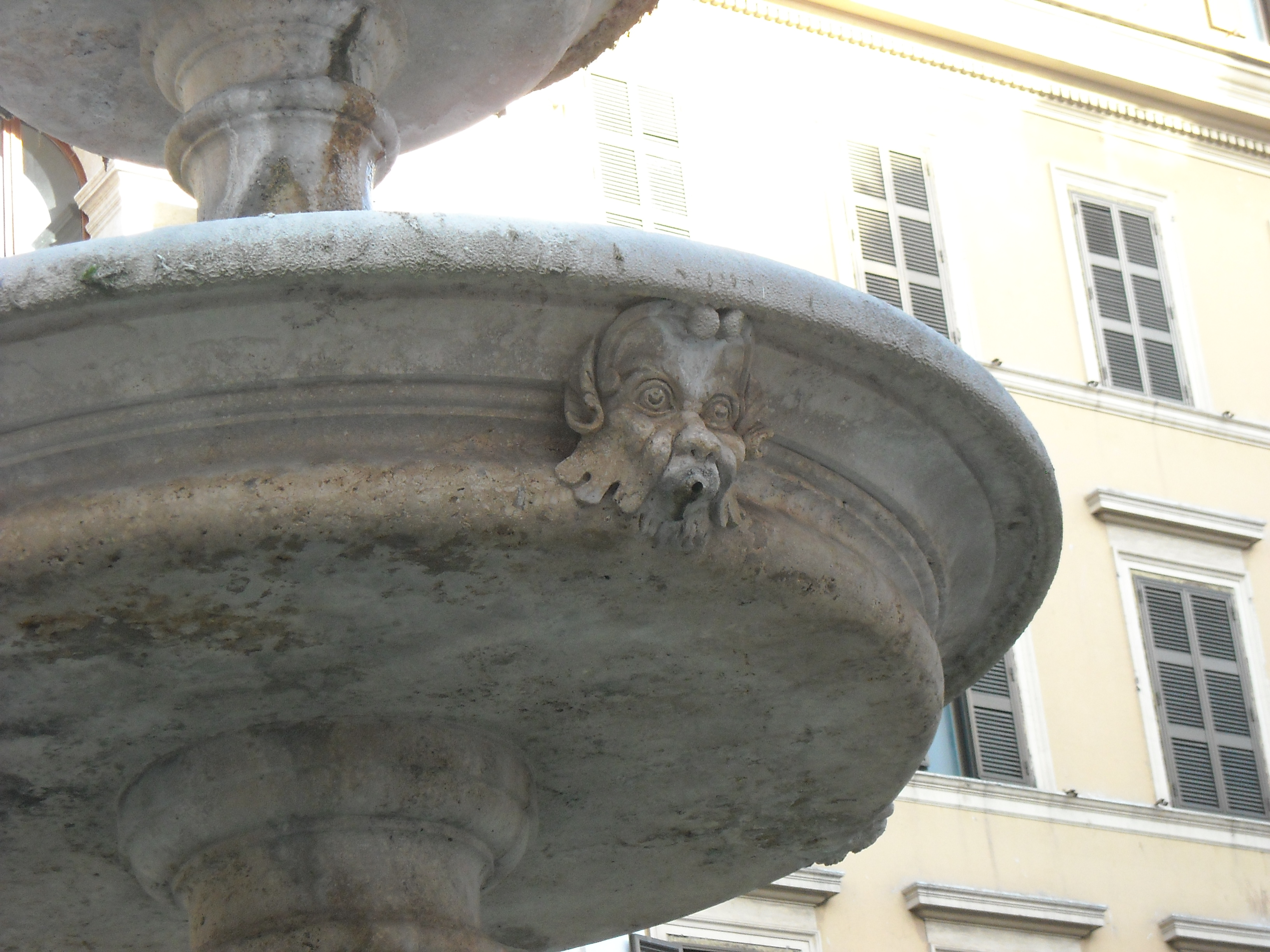 Fontana di piazza della Madonna dei Monti - particolare del mascherone